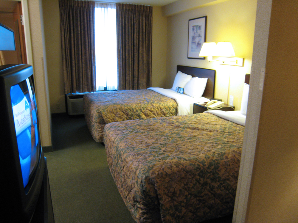 AmeriSuites, Vernon Hills IL